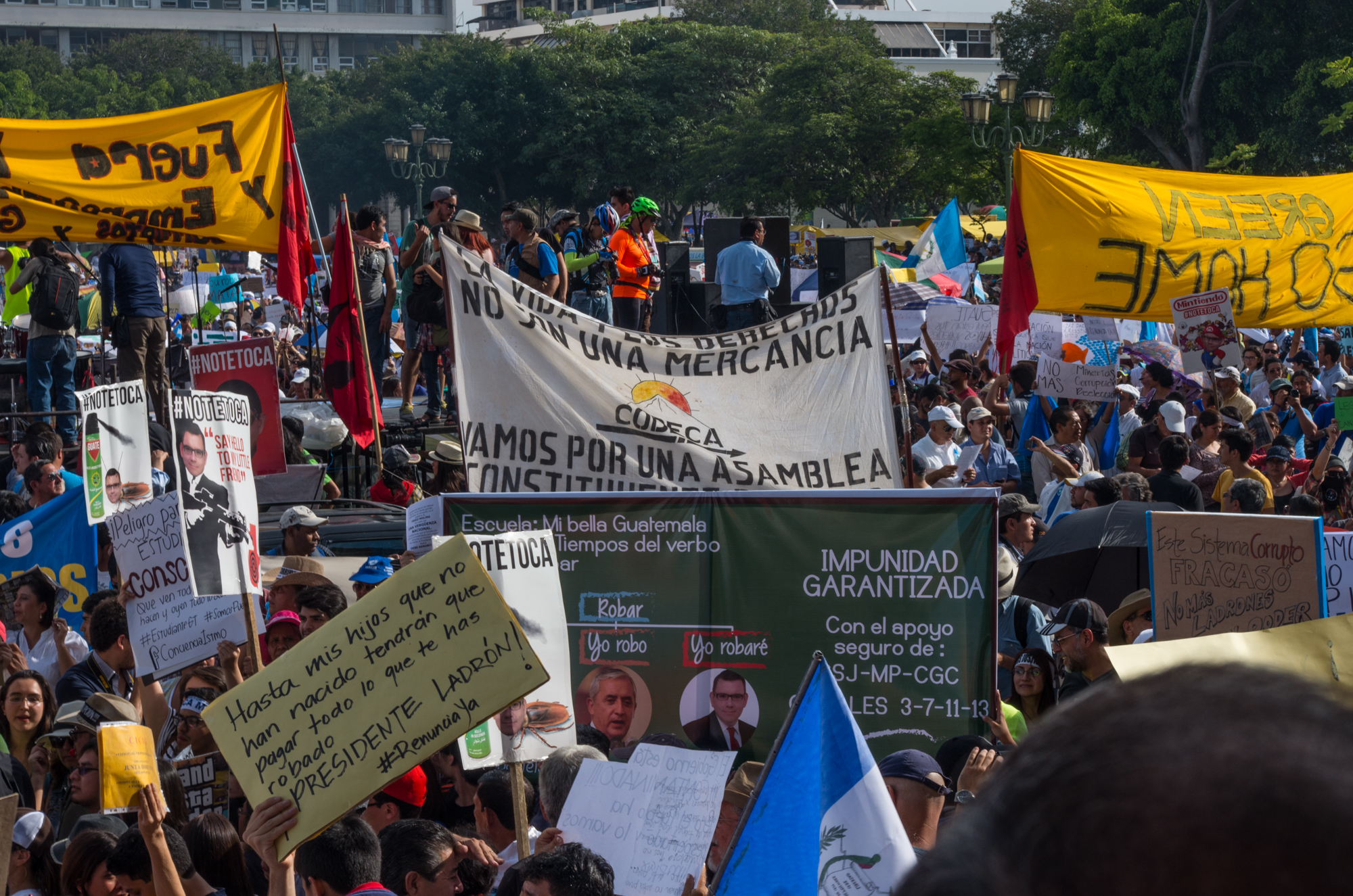 Manifestation citoyenne au Guatemala contre la corruption et pour demander la démission du gouvernement.